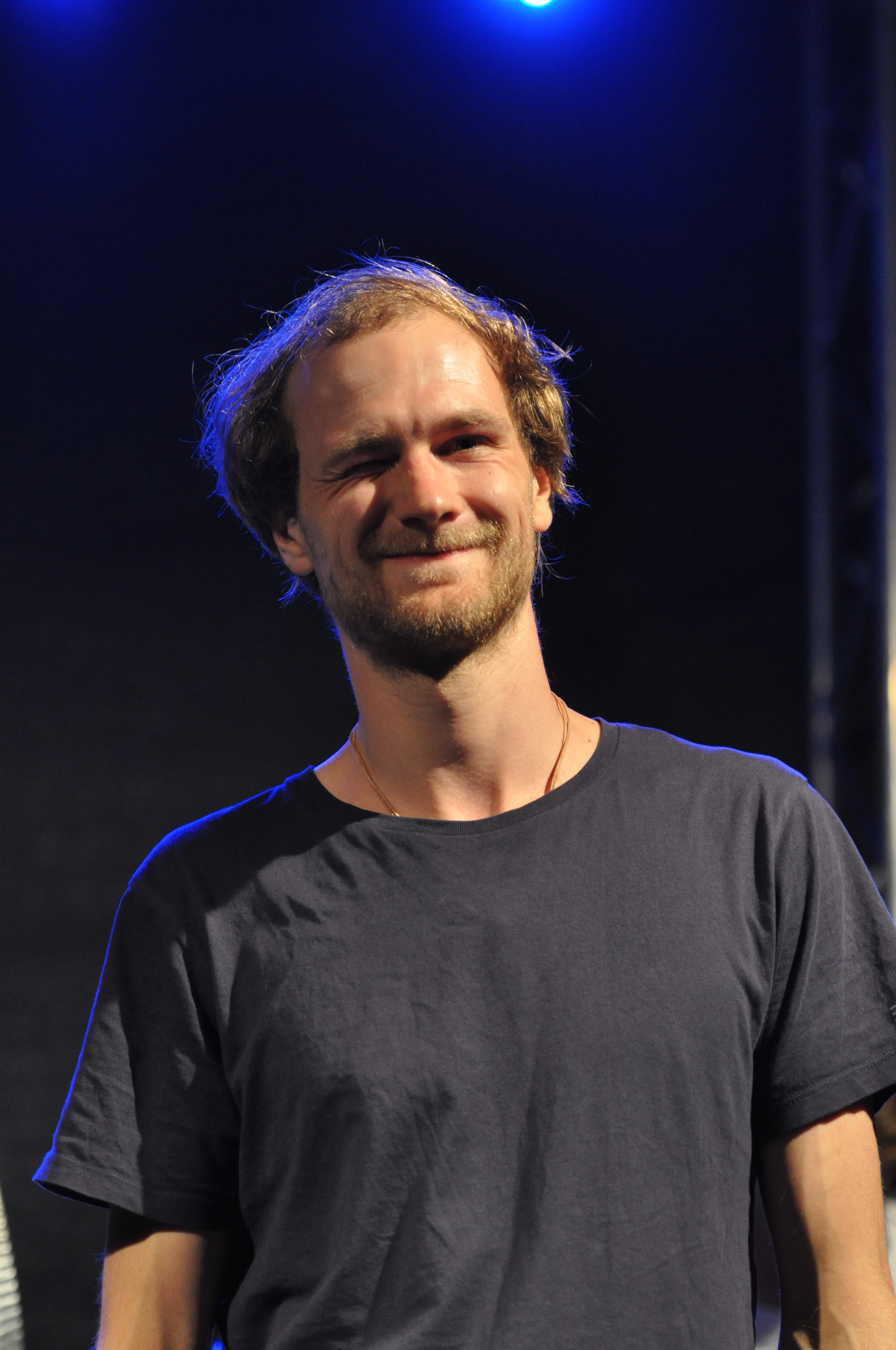 Robert Gwisdek, Schauspieler